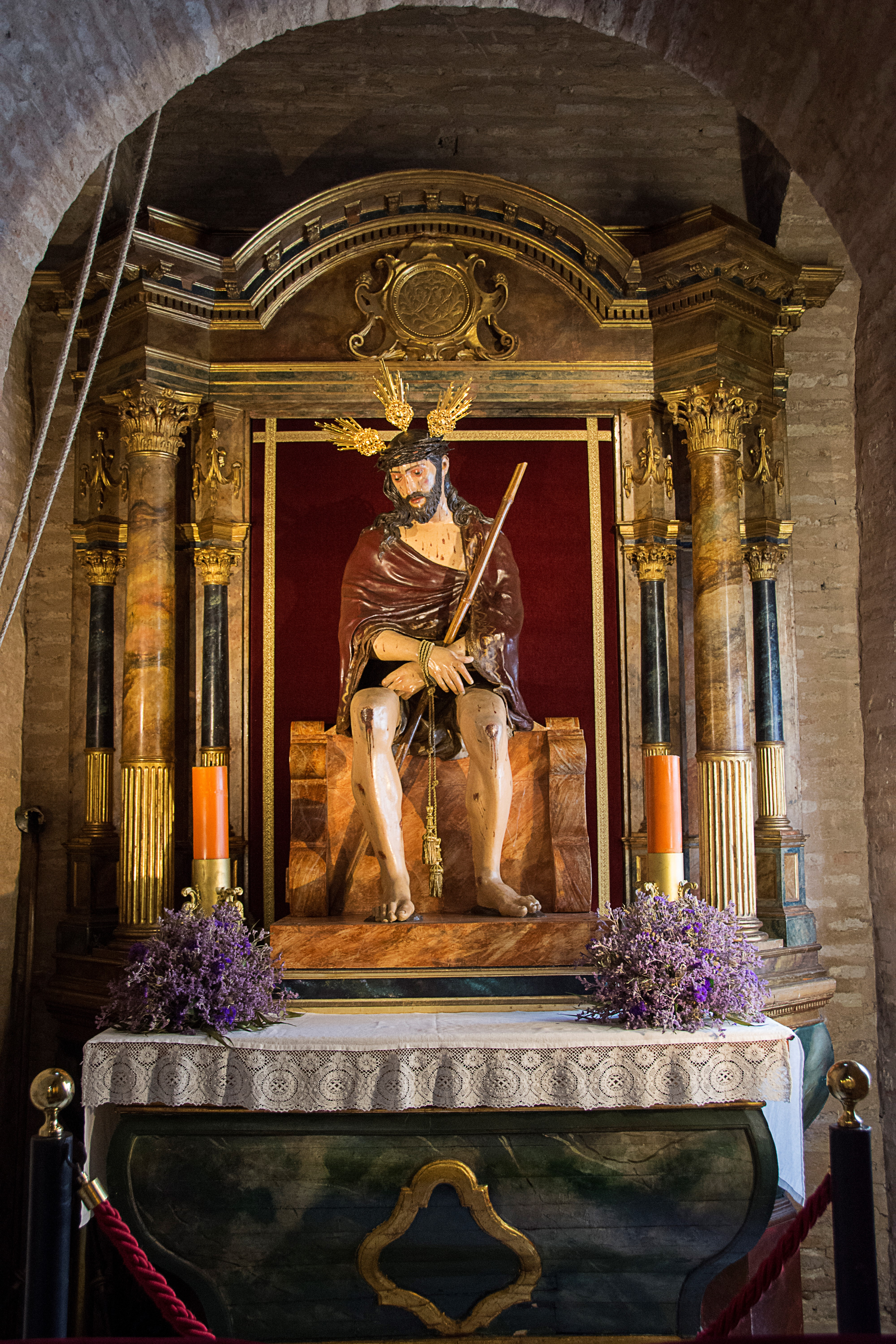 Cristo de Salud y Buen Viaje en la iglesia de San Esteban de Sevilla.